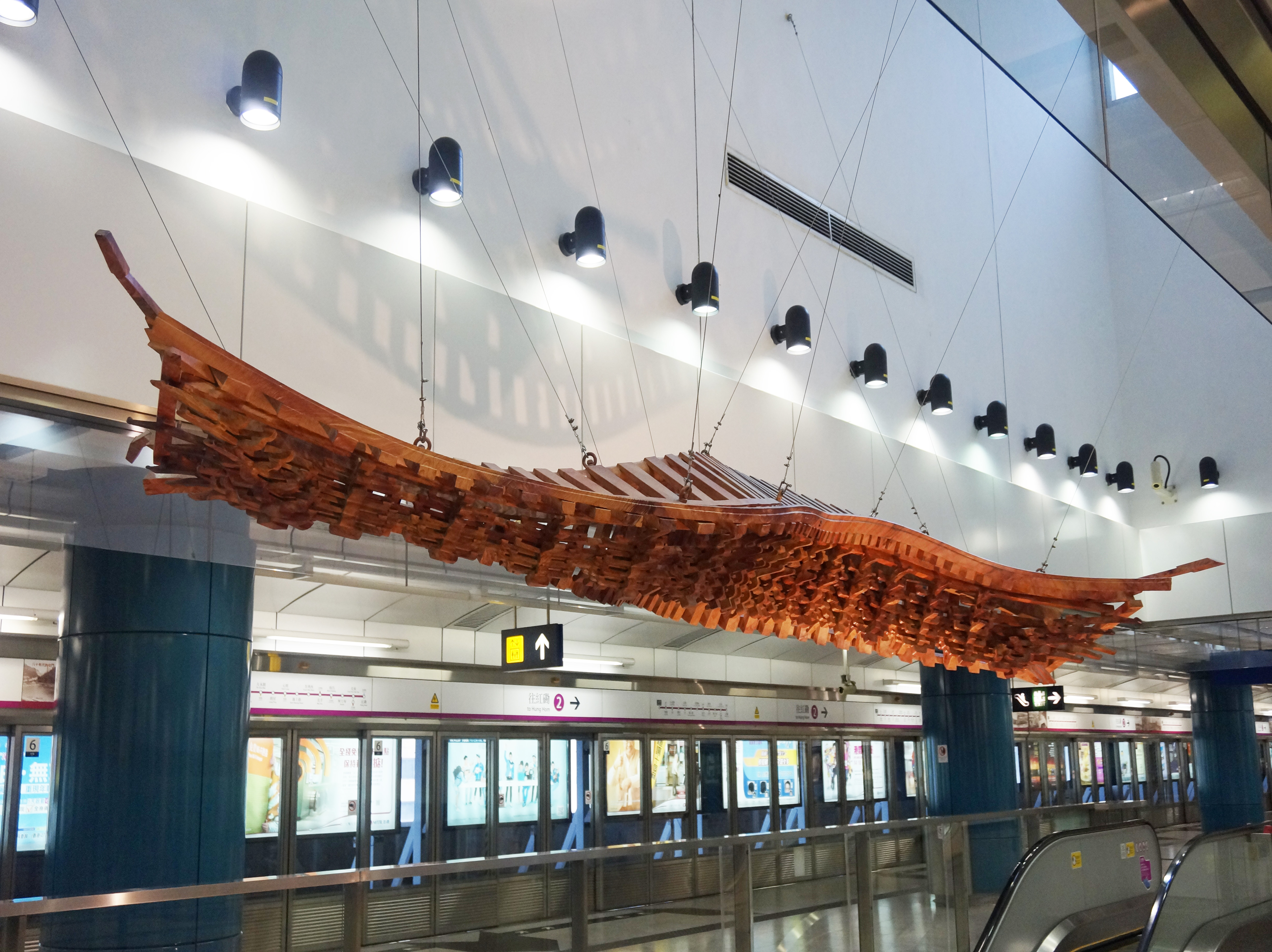 港鐵屯門站藝術品